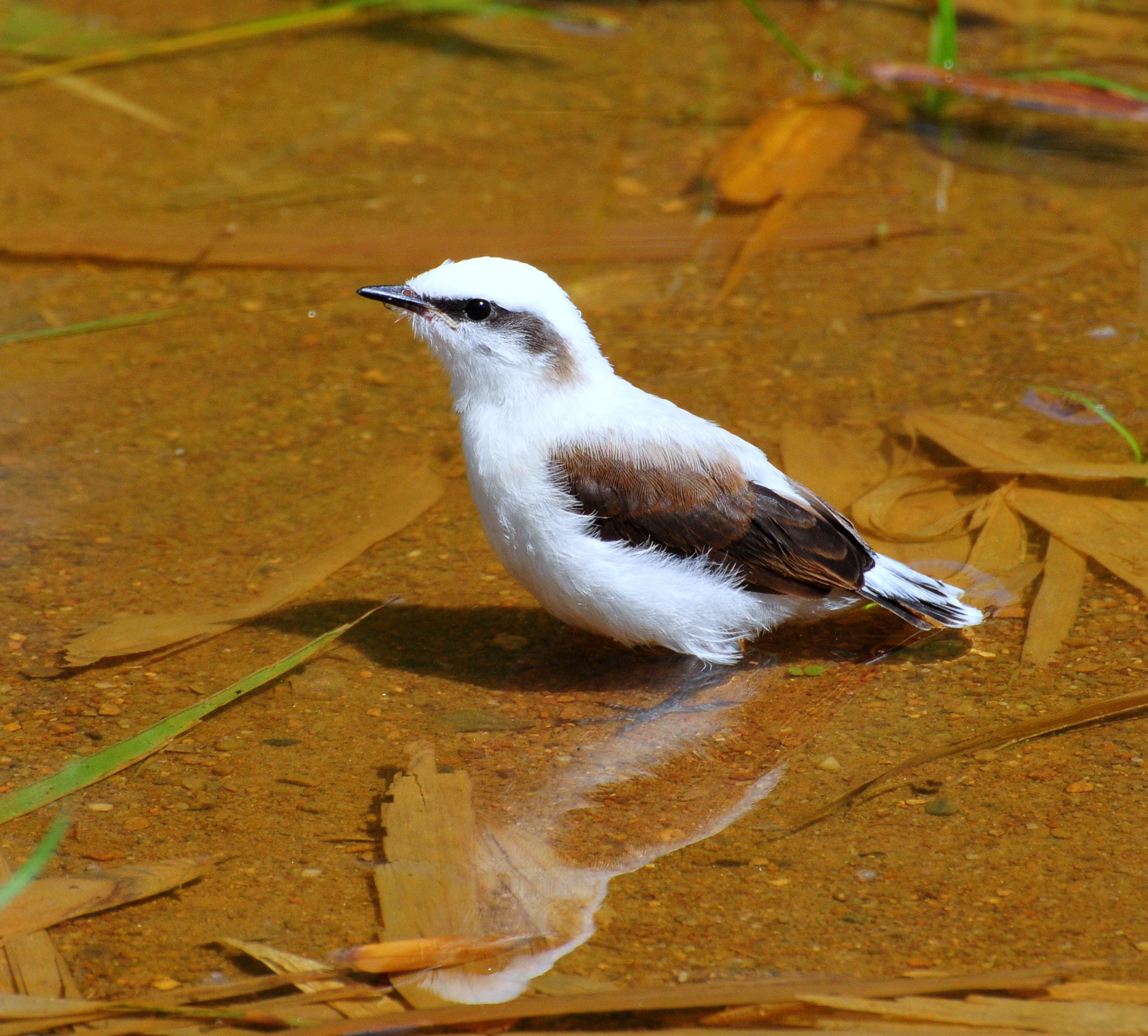 Lanchonete OASYS - Margem do rio Ribeira de Iguape - Registro-SP - Brasil